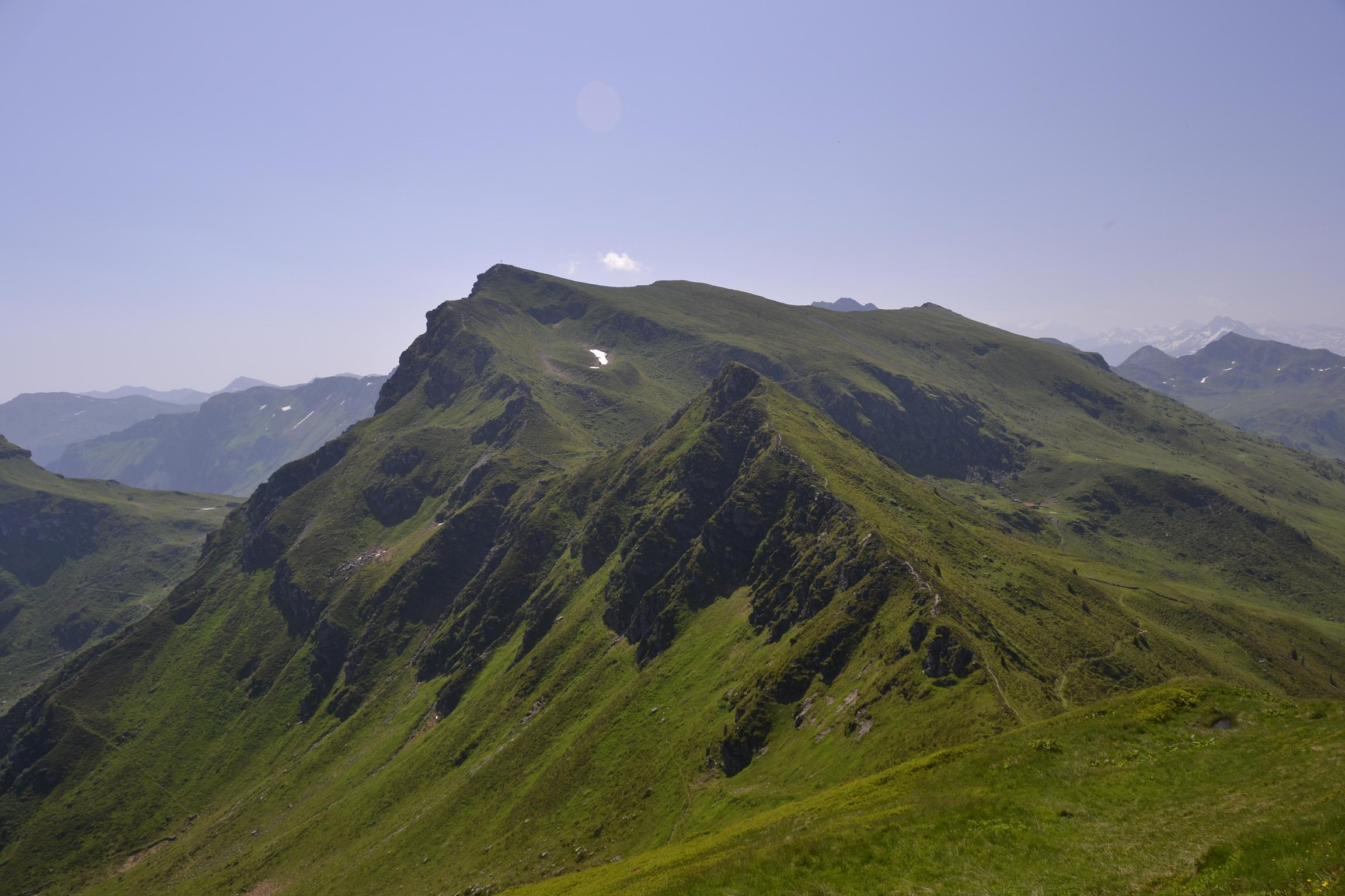 Gamshag vom Schützkogel aus gesehen